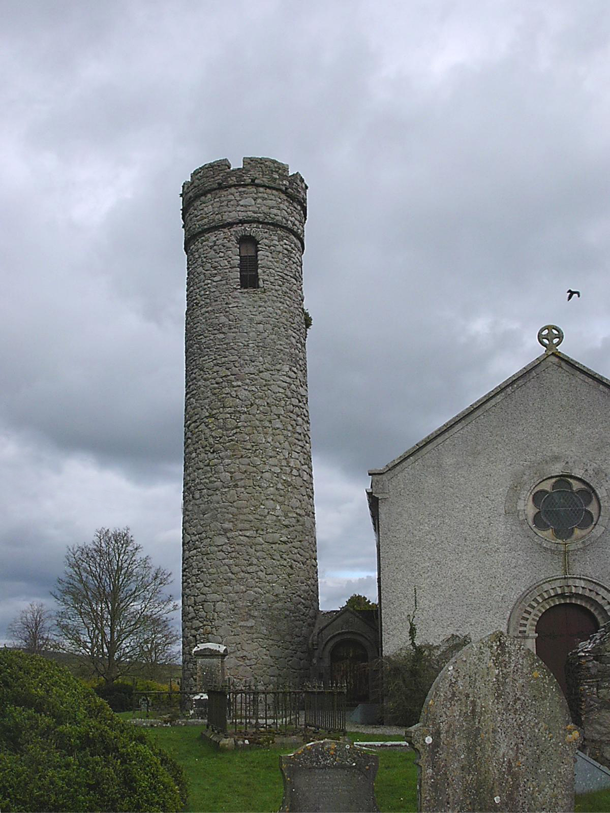 Castledermoti kerektorony (Írország)